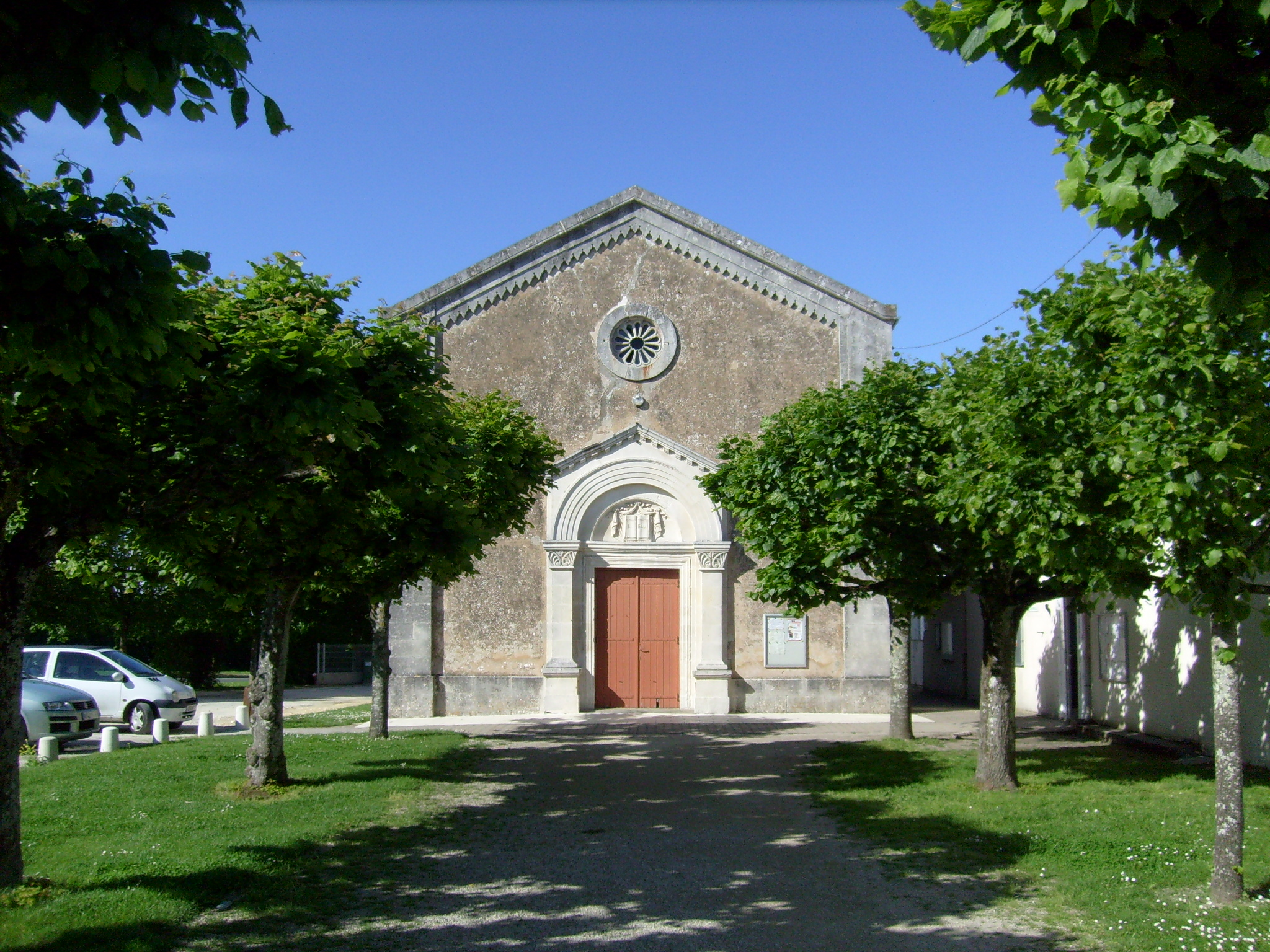 Temple protestant, Médis,Royan, Charente-Maritime, France